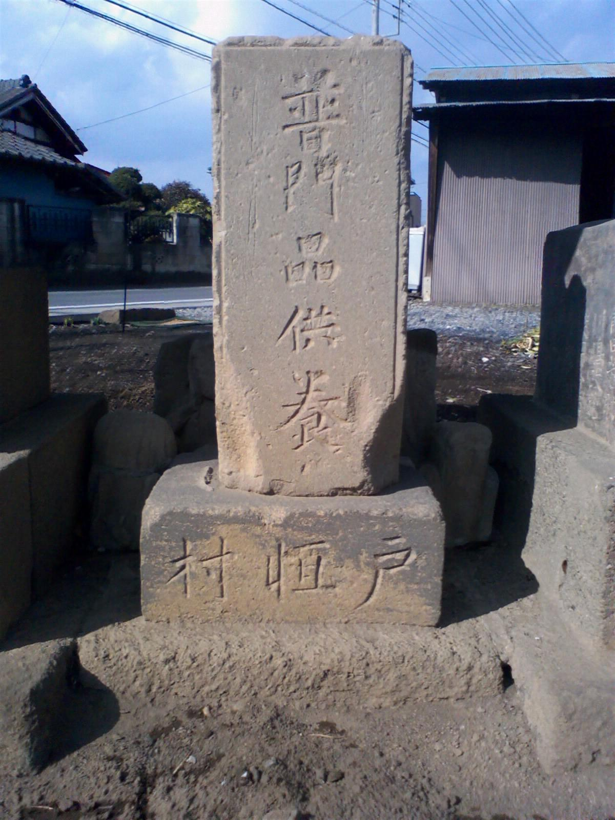 戸恒村の普門品供養塔